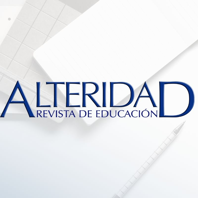 Portada de la revista Alteridad